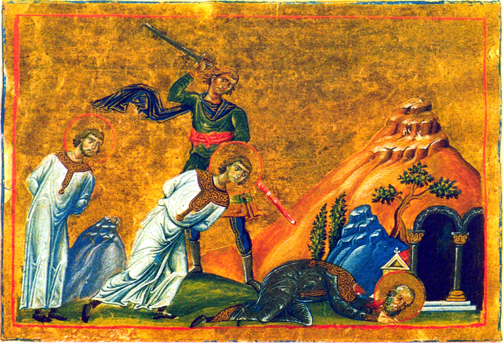 saints Probus, Tarachus and Andronicus, Menologion of Basil II // Οι άγιοι Πρόβος, Τάραχος και Ανδρόνικος. Από το Μηνολόγιον του αυτοκράτορα Βασιλείου Β' (11ος αι.).